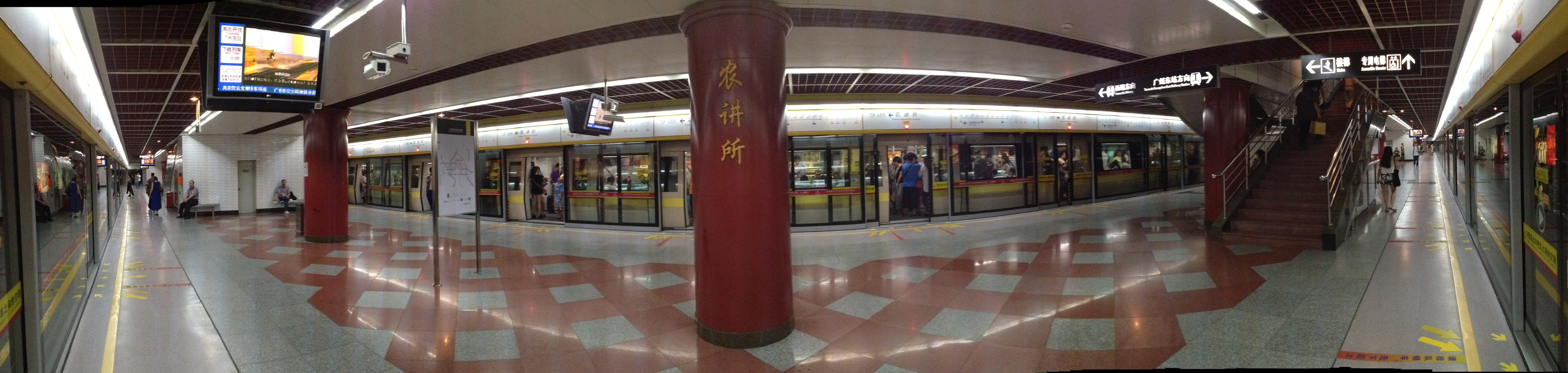 广州地铁农讲所站月台全景图